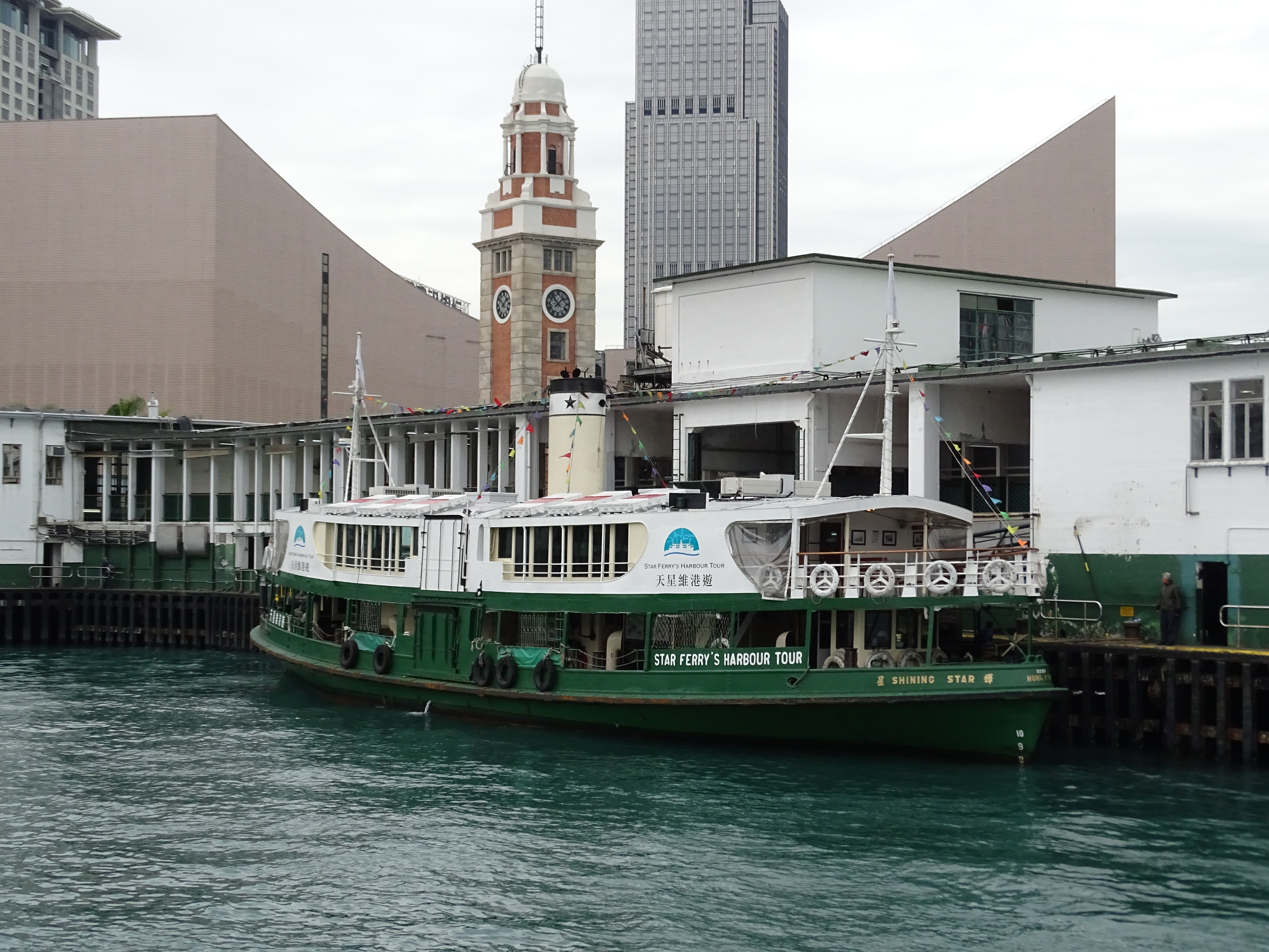 Anlegestelle der Star Ferry, im Hintergrund Clock Tower, District Tsim Sha Tsui, Kowloon, Hong Kong